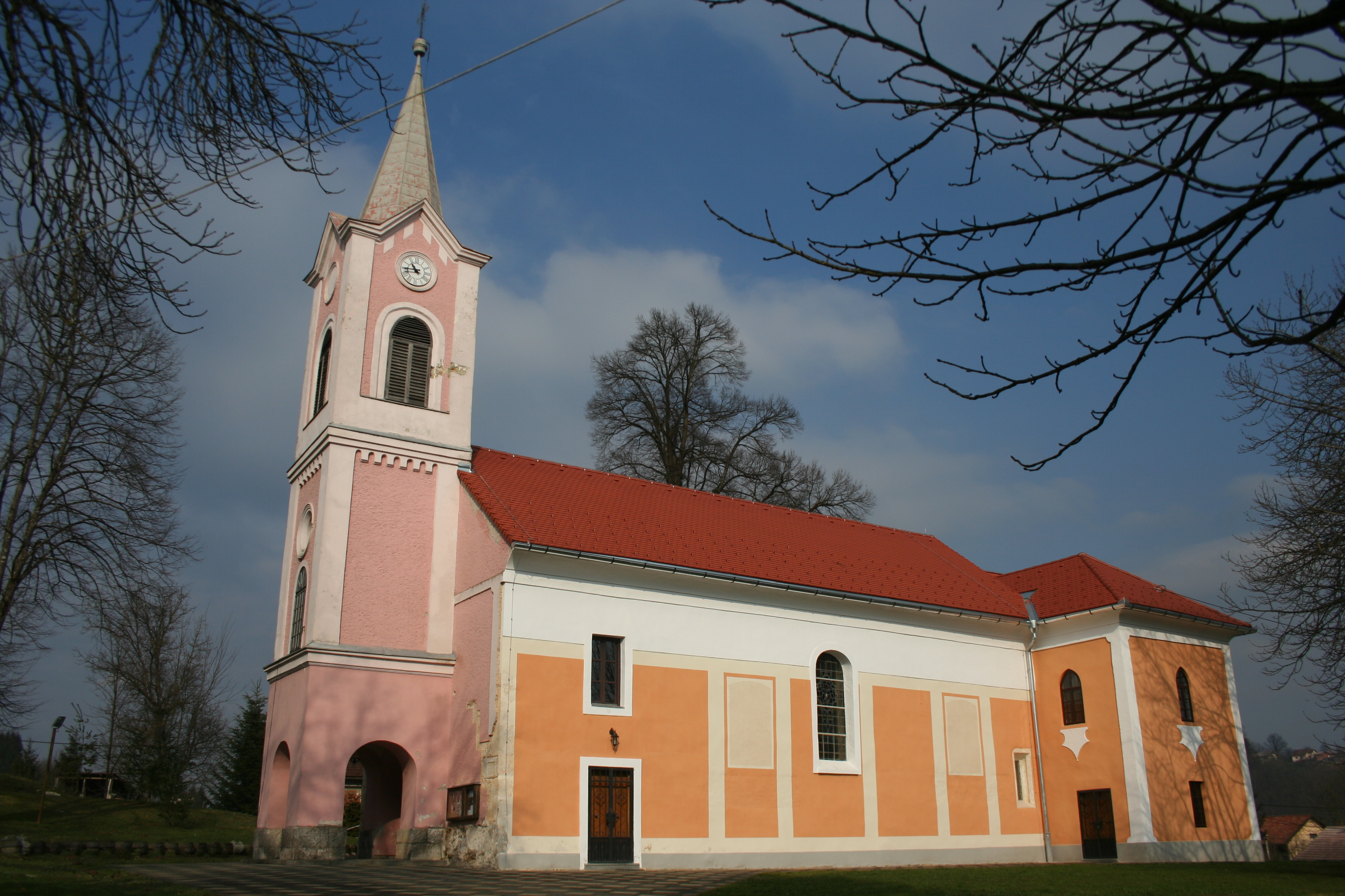 Crkva u Novigradu na Dobri